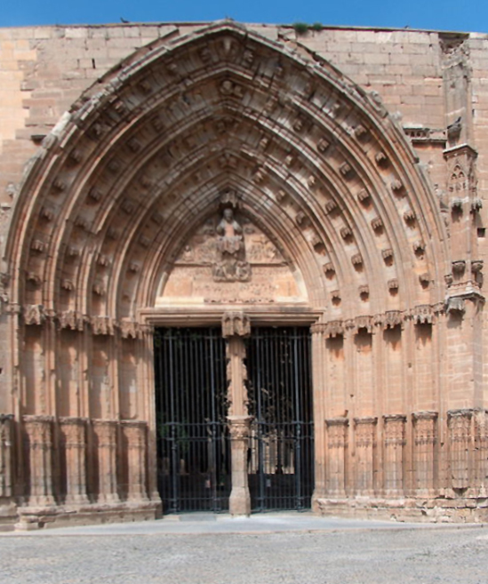 Sé Velha de Lérida. Sé Velha de Lérida em Espanha.